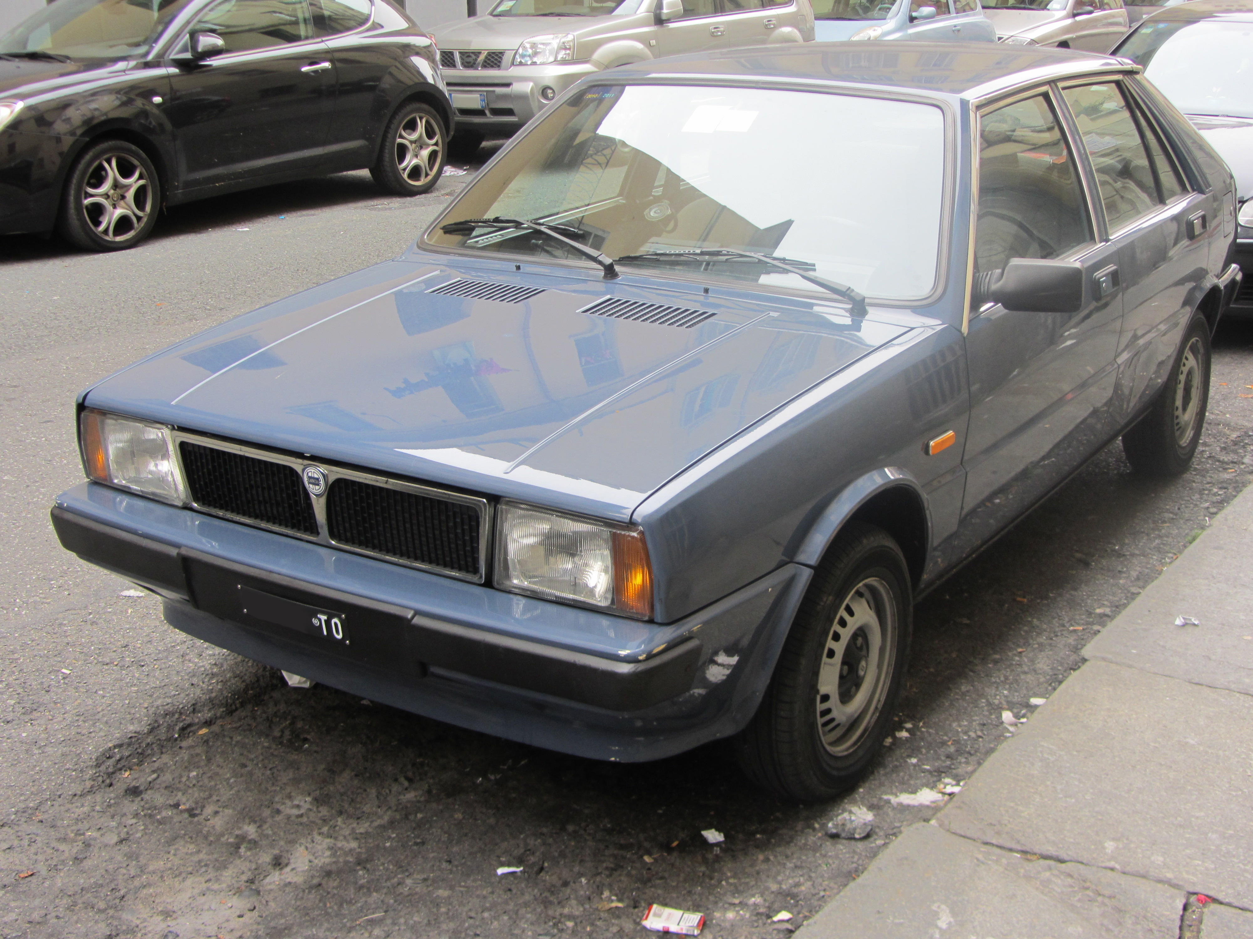 la lancia delta 1979 a Torino